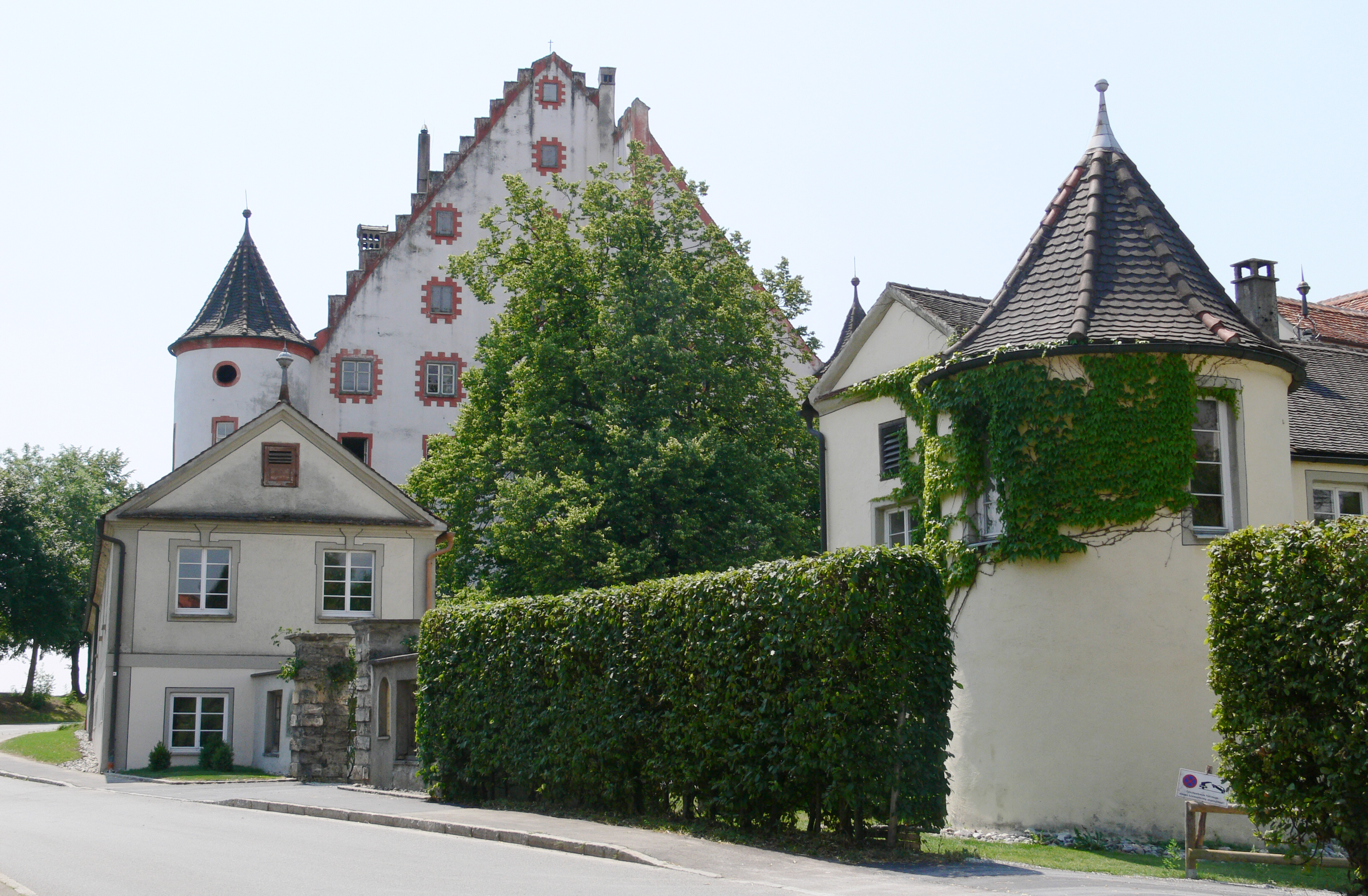 Altes Schloss Kißlegg, Kreis Ravensburg, Baden-Württemberg, Deutschland